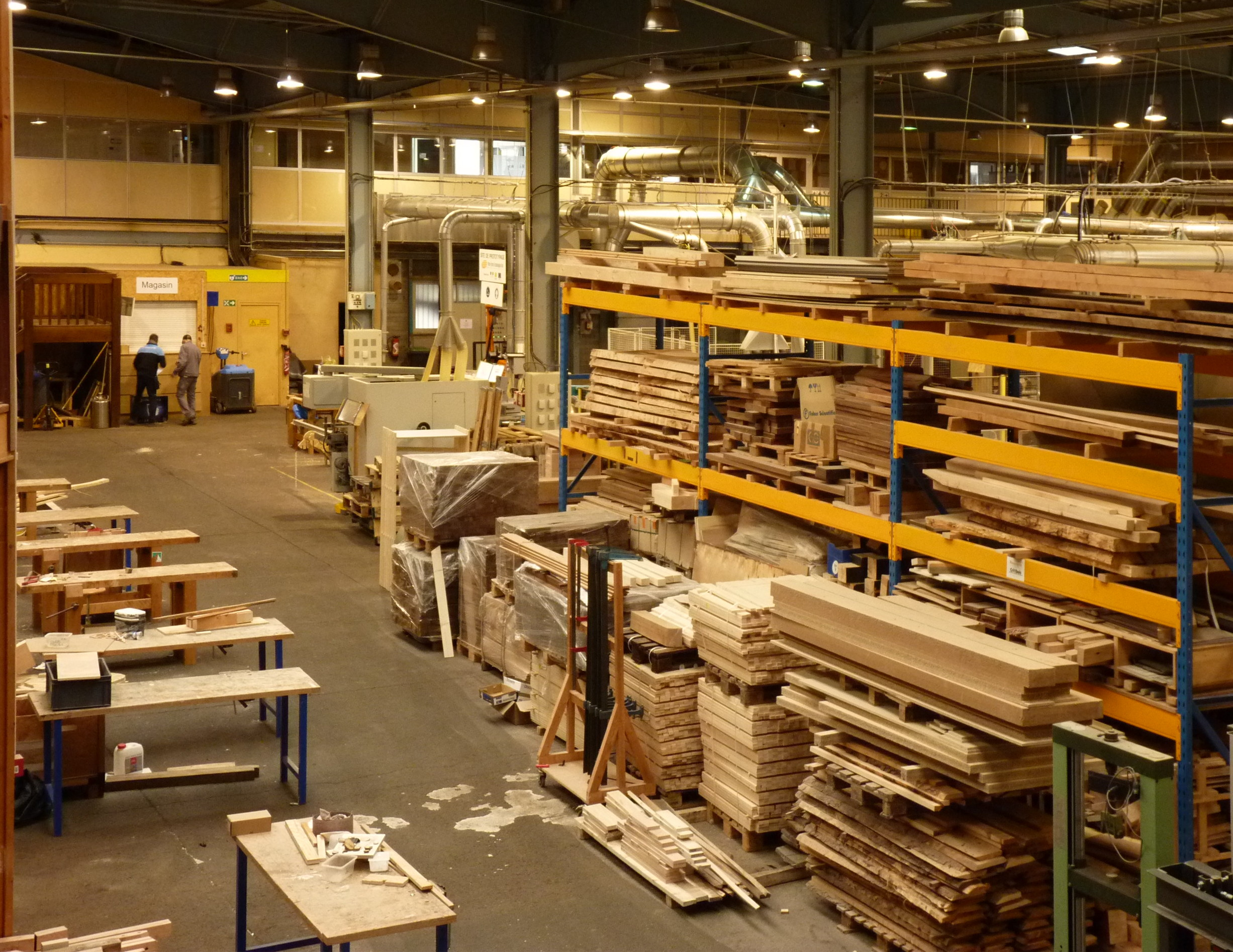 L'école ENSTIB (Épinal, département des Vosges, France) : établis de menuiserie et zone de stockage du bois